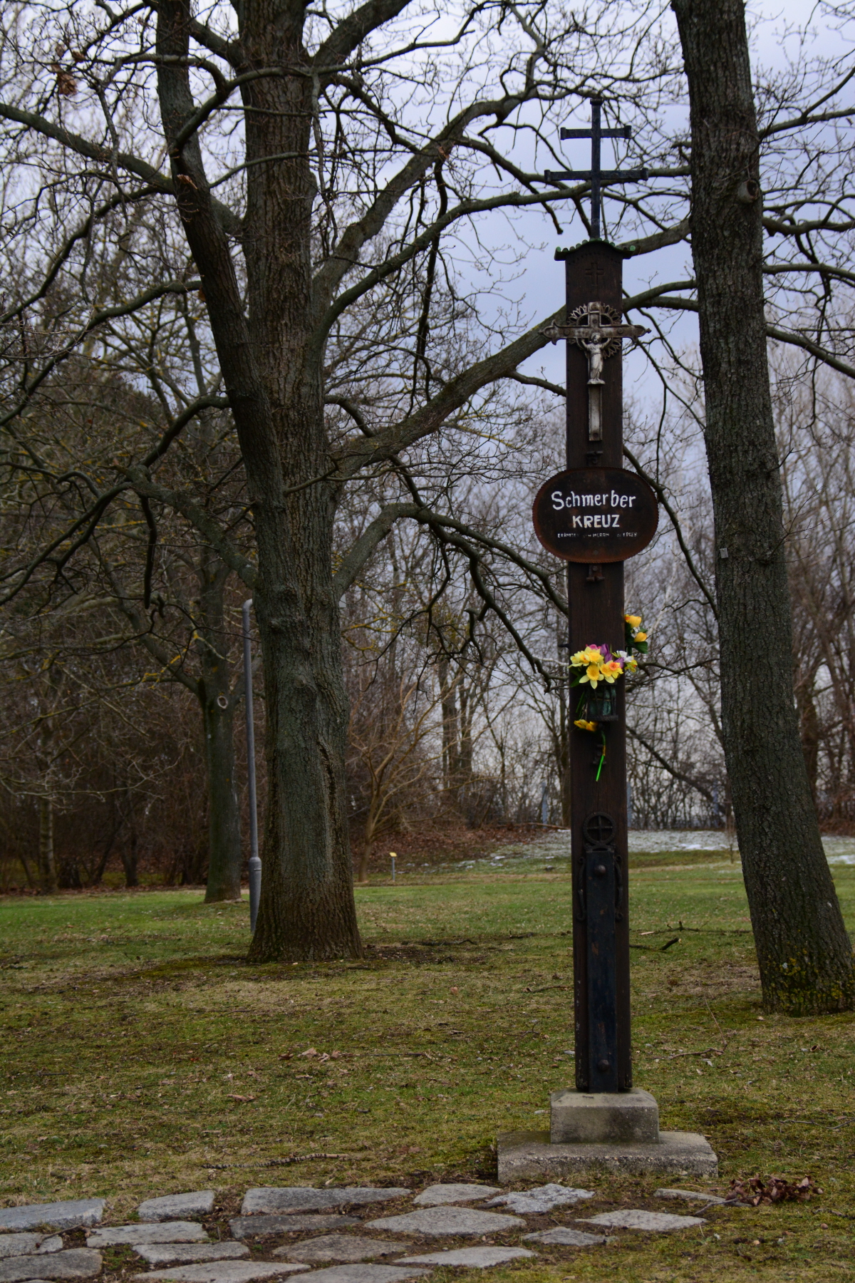 Das Schmerberkreuz am Nordende des Parks